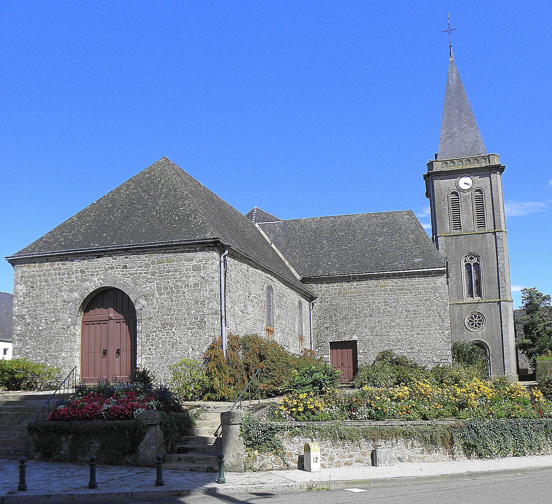 Église Saint-Martin de Châtillon-sur-Colmont (53). Façade occidentale et flanc sud.